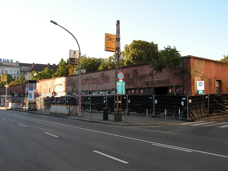 A 2005 augusztusában lebontott Károly körúti bazársor Budapesten